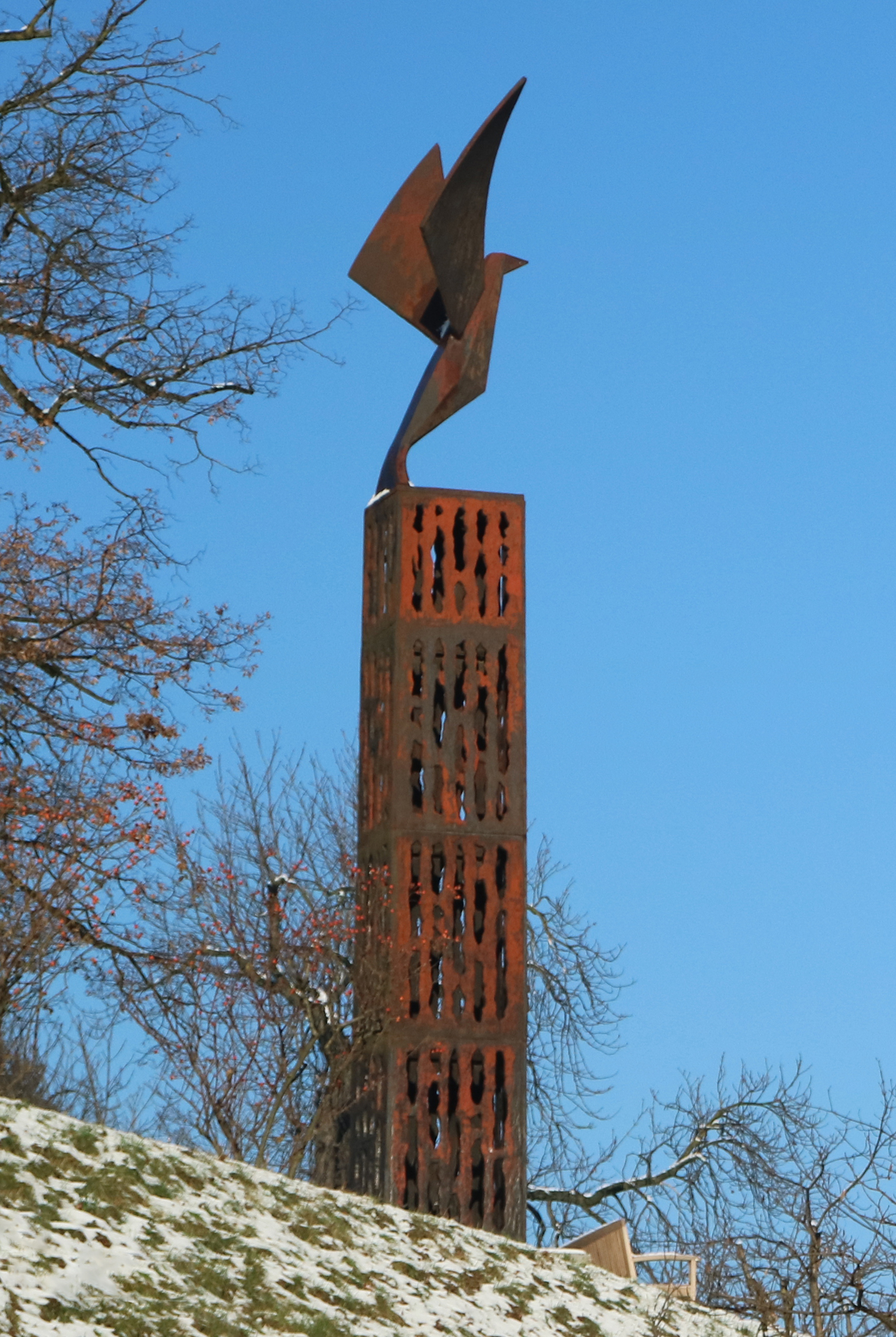 Befreiungsdenkmal von Wolfgang Skala (1960) im Grazer Burggarten